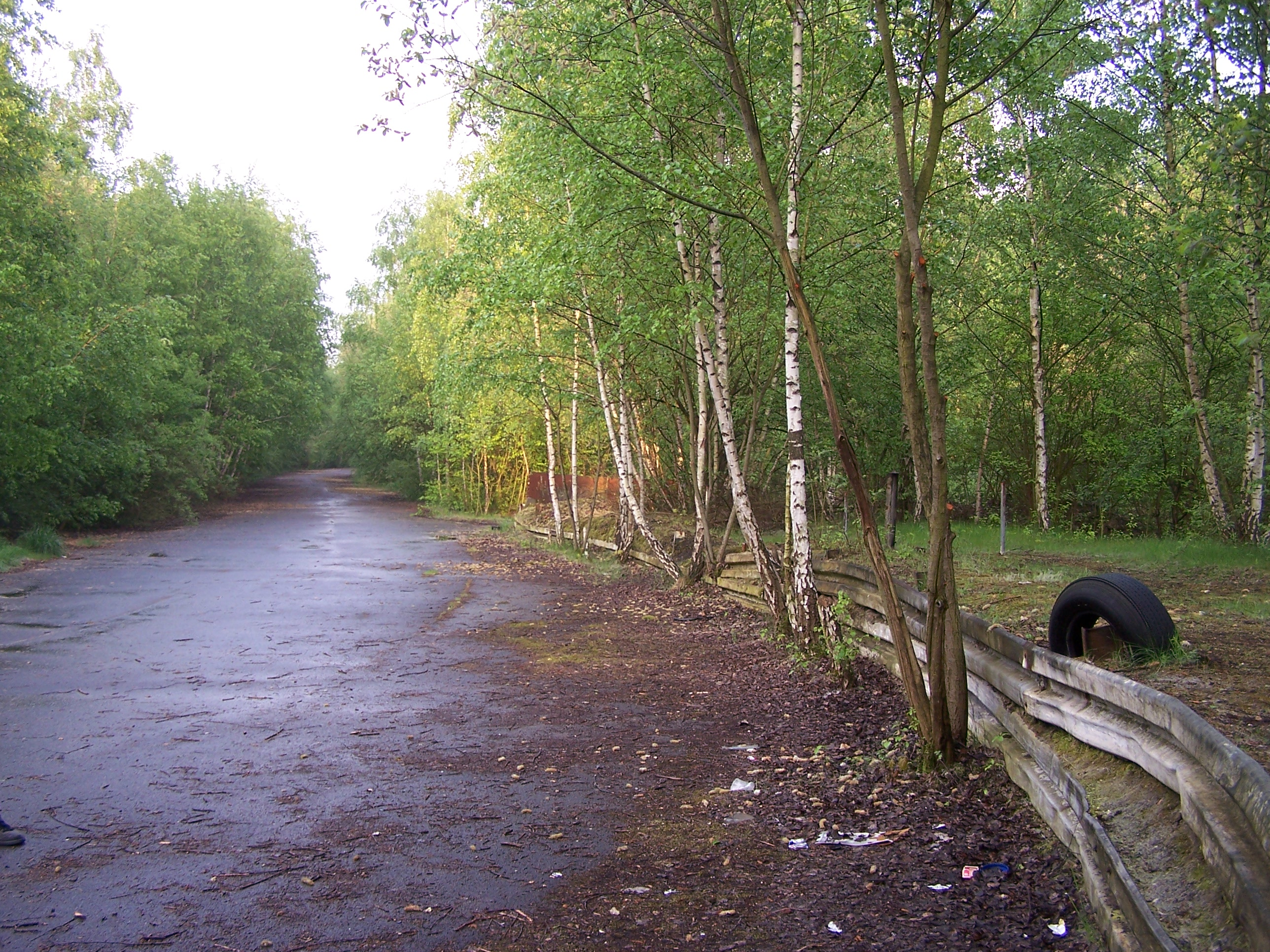 Speedway Motodrom Gelsenkirchen, Blick aus der Haarnadelkurve auf die Gegengerade, in der Bildmitte die Einfahrt zum Fahrerlager.